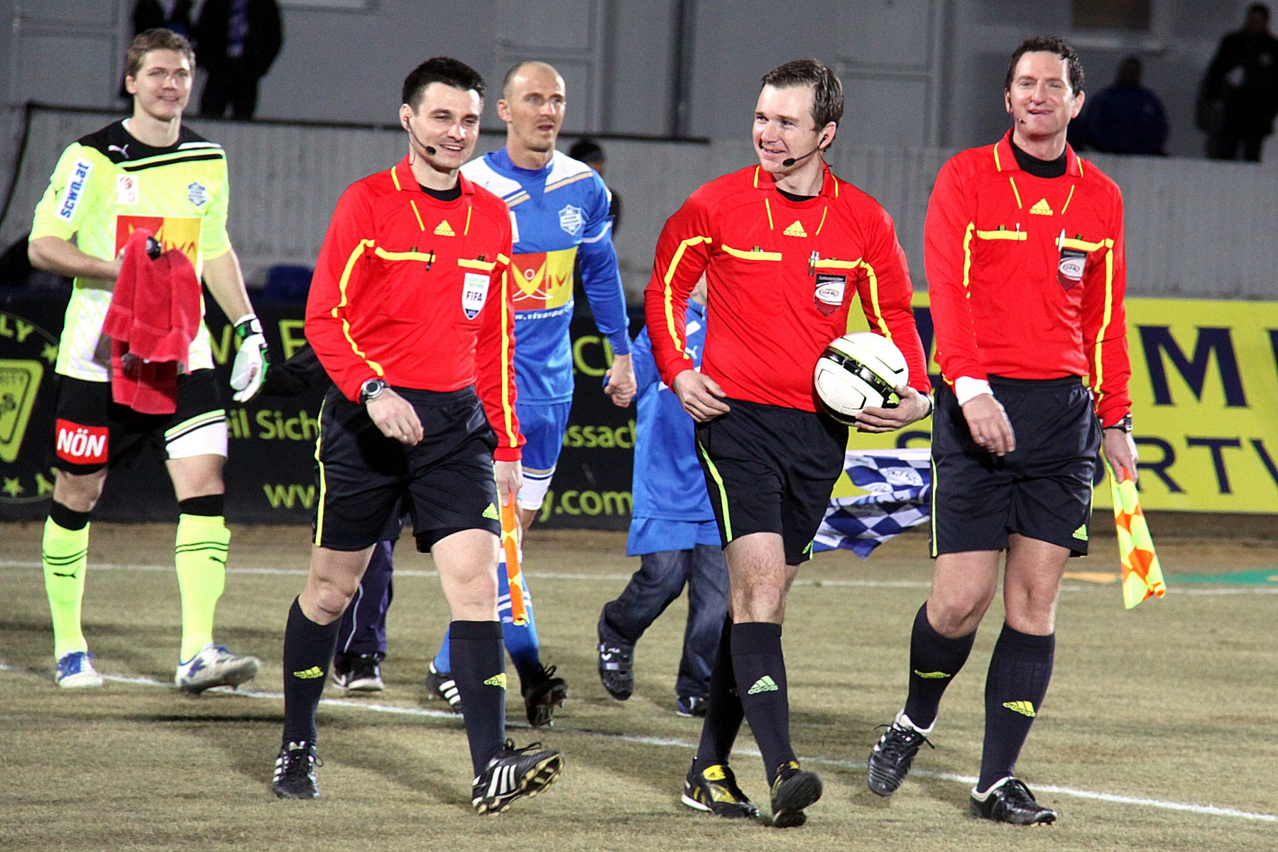 Meisterschaftsspiel der österreichischen Bundesliga: SC Wiener Neustadt gegen FC Wacker Innsbruck am 25. Februar 2012 (0:0) im Wiener Neustädter Stadion. - Das Foto zeigt die Schiedsrichter Dieter Muckenhammer (Mitte) und seine Schiedsrichterassistenten Andreas Rothmann (rechts) und Roland Brandner beim Betreten des Spielfeldes. Es war dies das erste Bundesligaspiel von Dieter Muckenhammer.